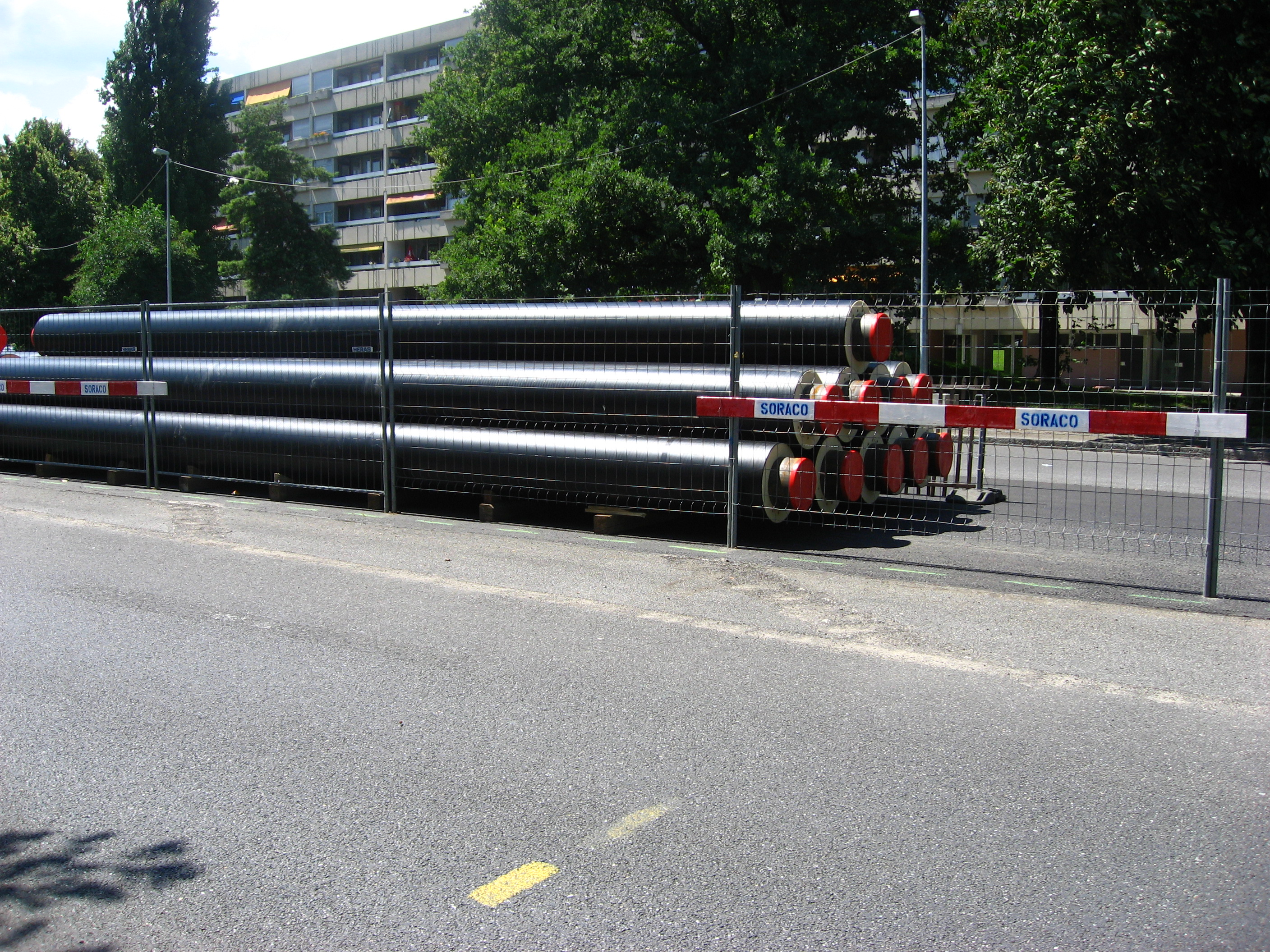 Tuyau pour le chauffage à distance, photographié à Meyrin lors de l'extension du réseau de Genève.